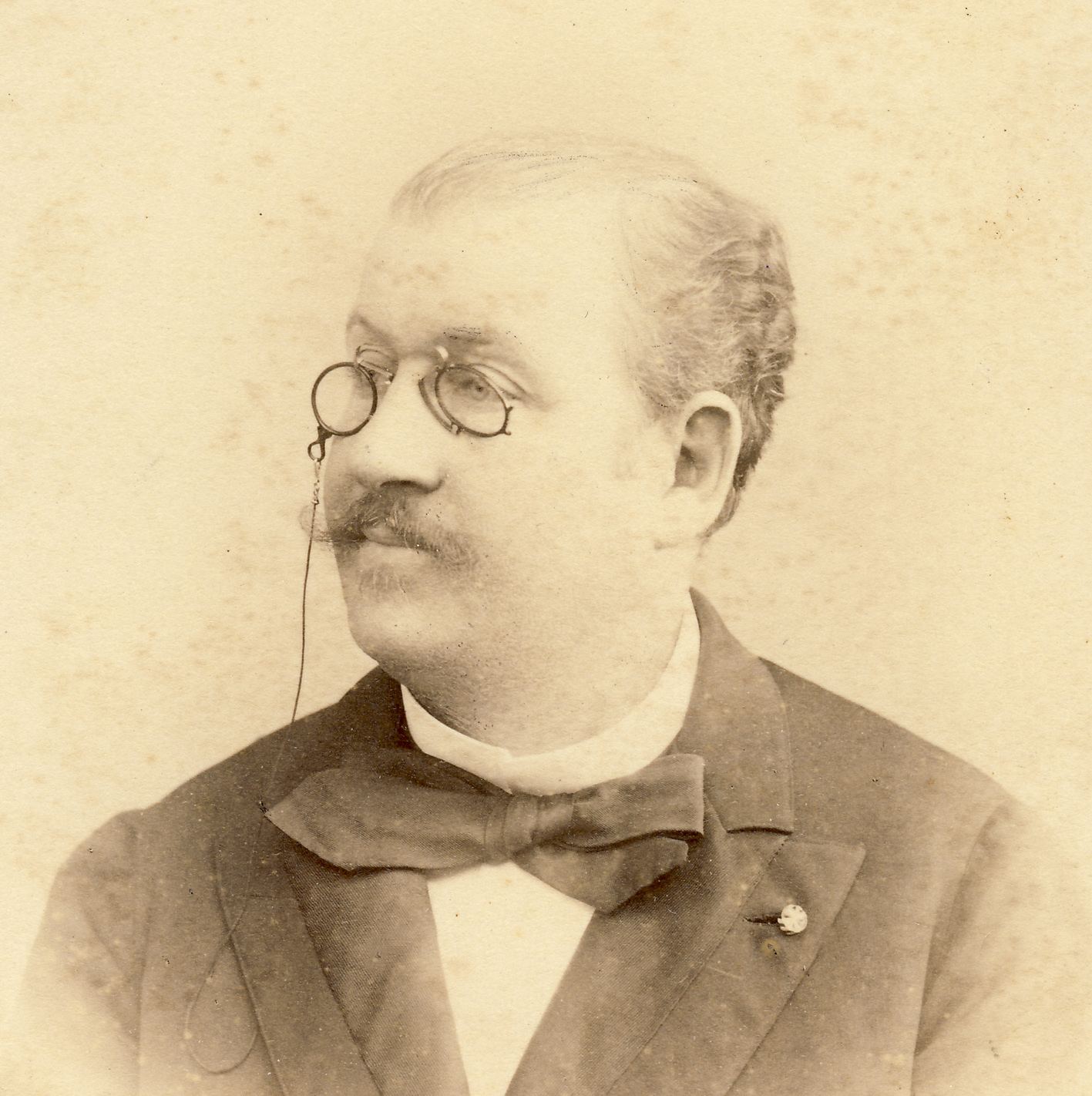 Ernest Demanne en 1894